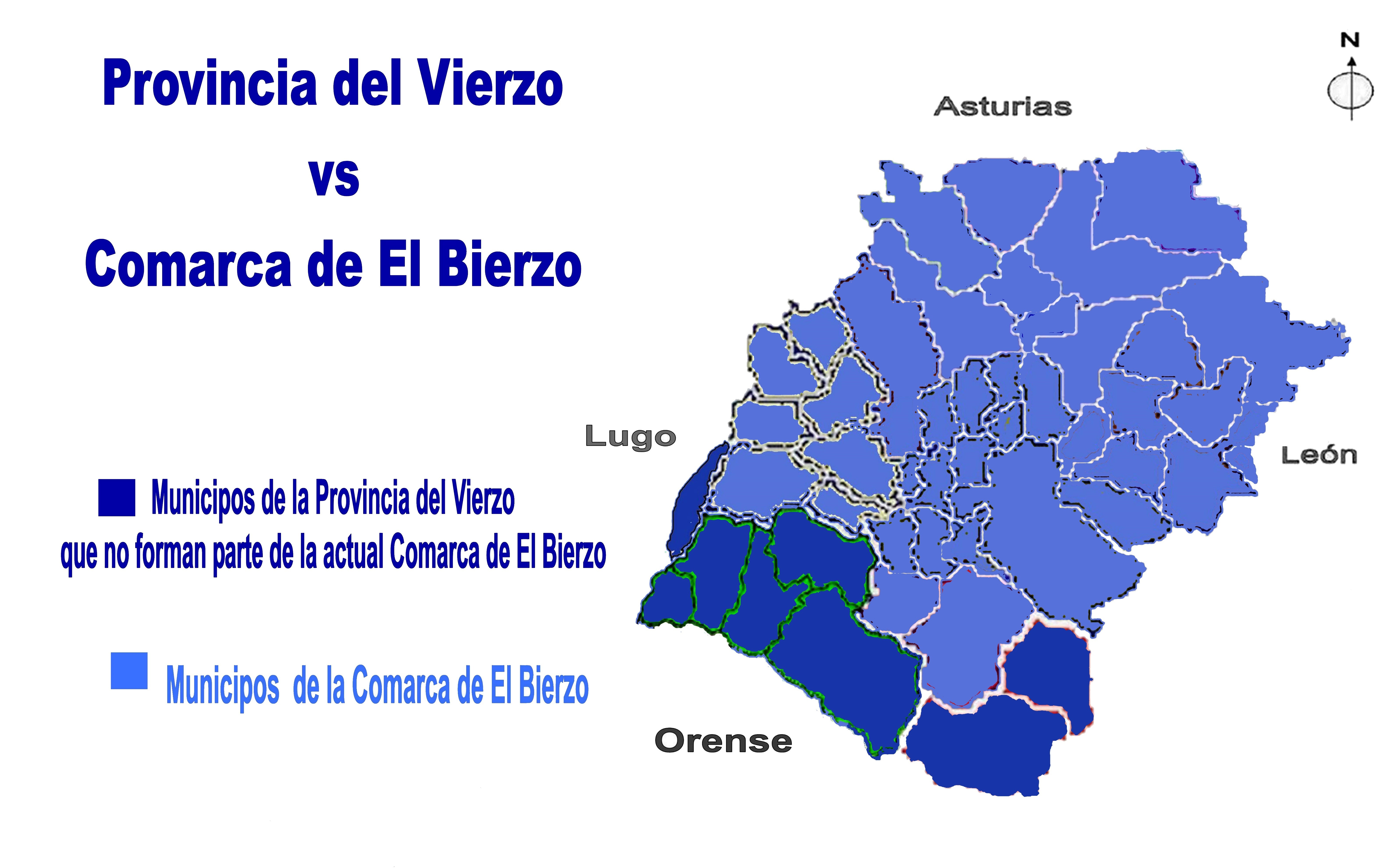 La Provincia de El Bierzo (Provincia del Vierzo) de 1821 en comparación con la actual Comarca de El Bierzo